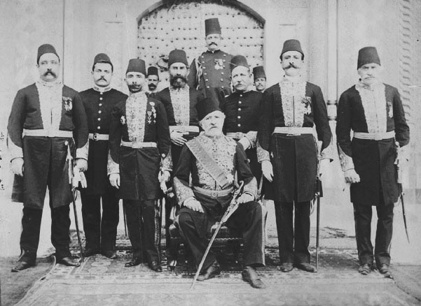 Wasa Bacha, Mutassarif Jabal Loubnan [1880s]